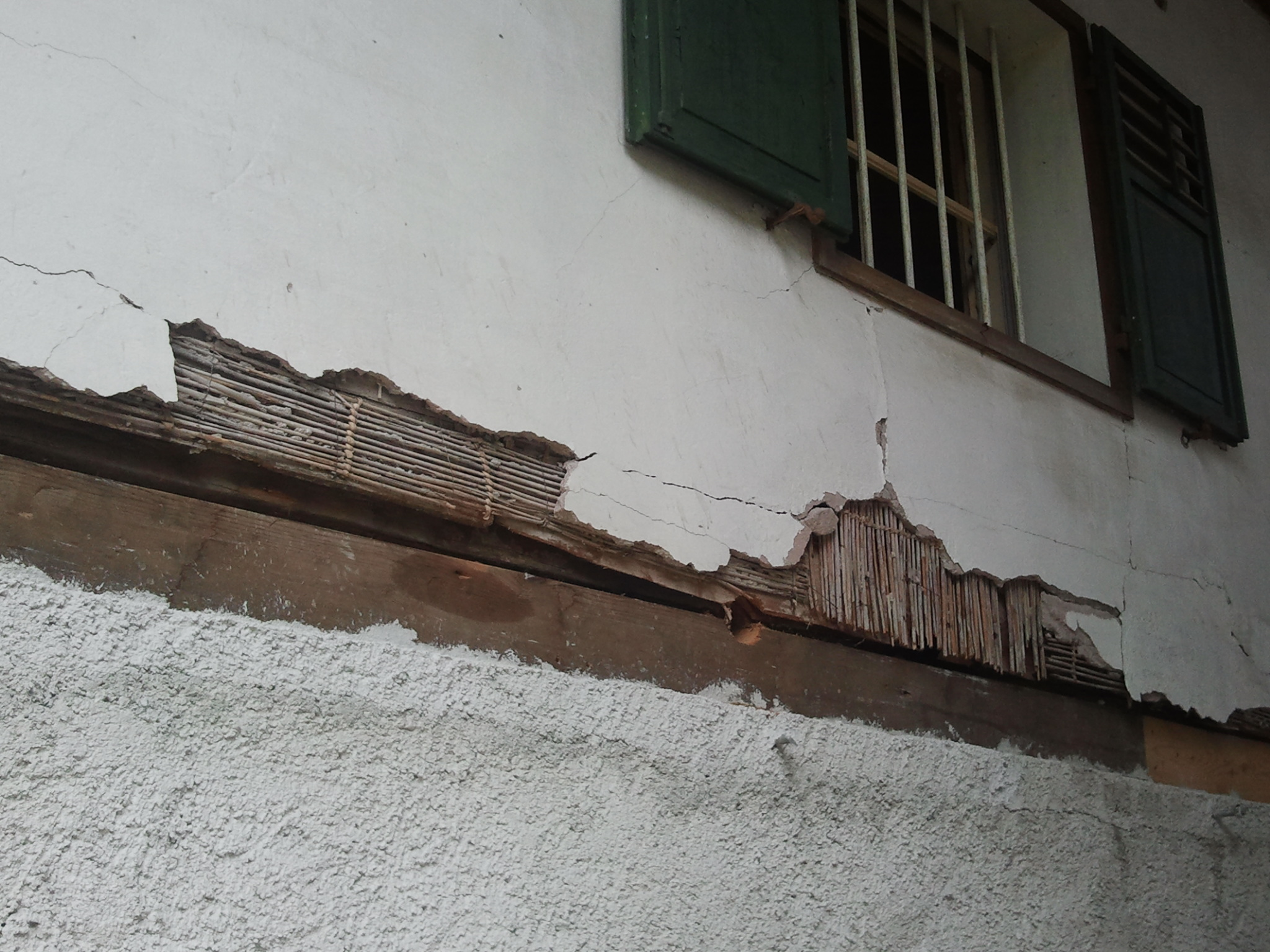 Lumbaart: Arèle in del mür de öna cà de la Al Gardéna.